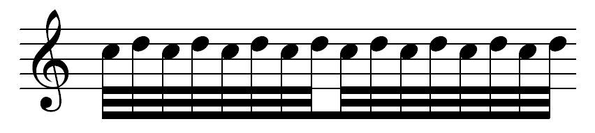 trill execution since 1800